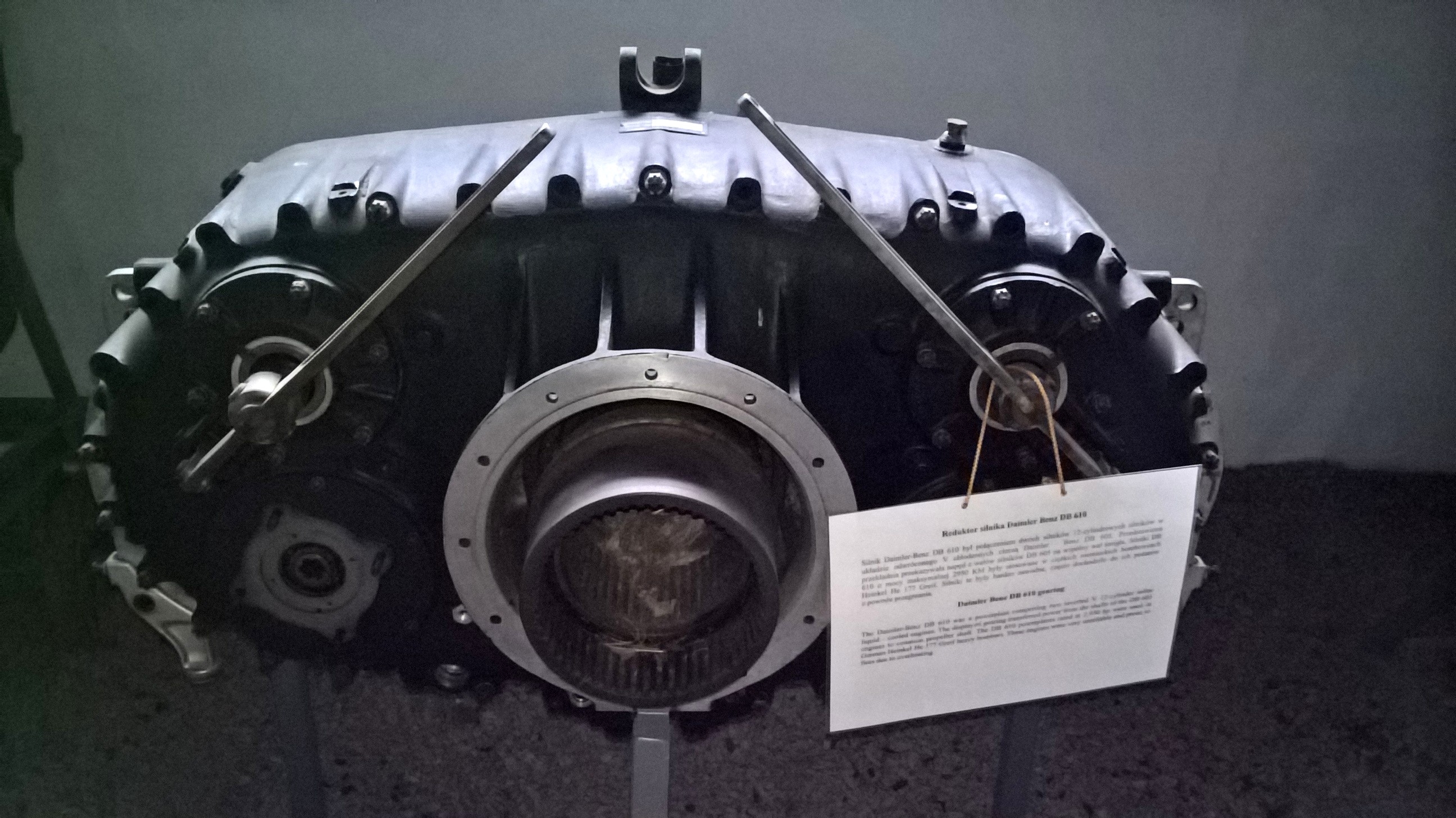 Reduktor niemieckiego 24-cylindrowego silnika widlastego Daimler-Benz DB 610 ze zbiorów Muzeum Lotnictwa Polskiego w Krakowie.